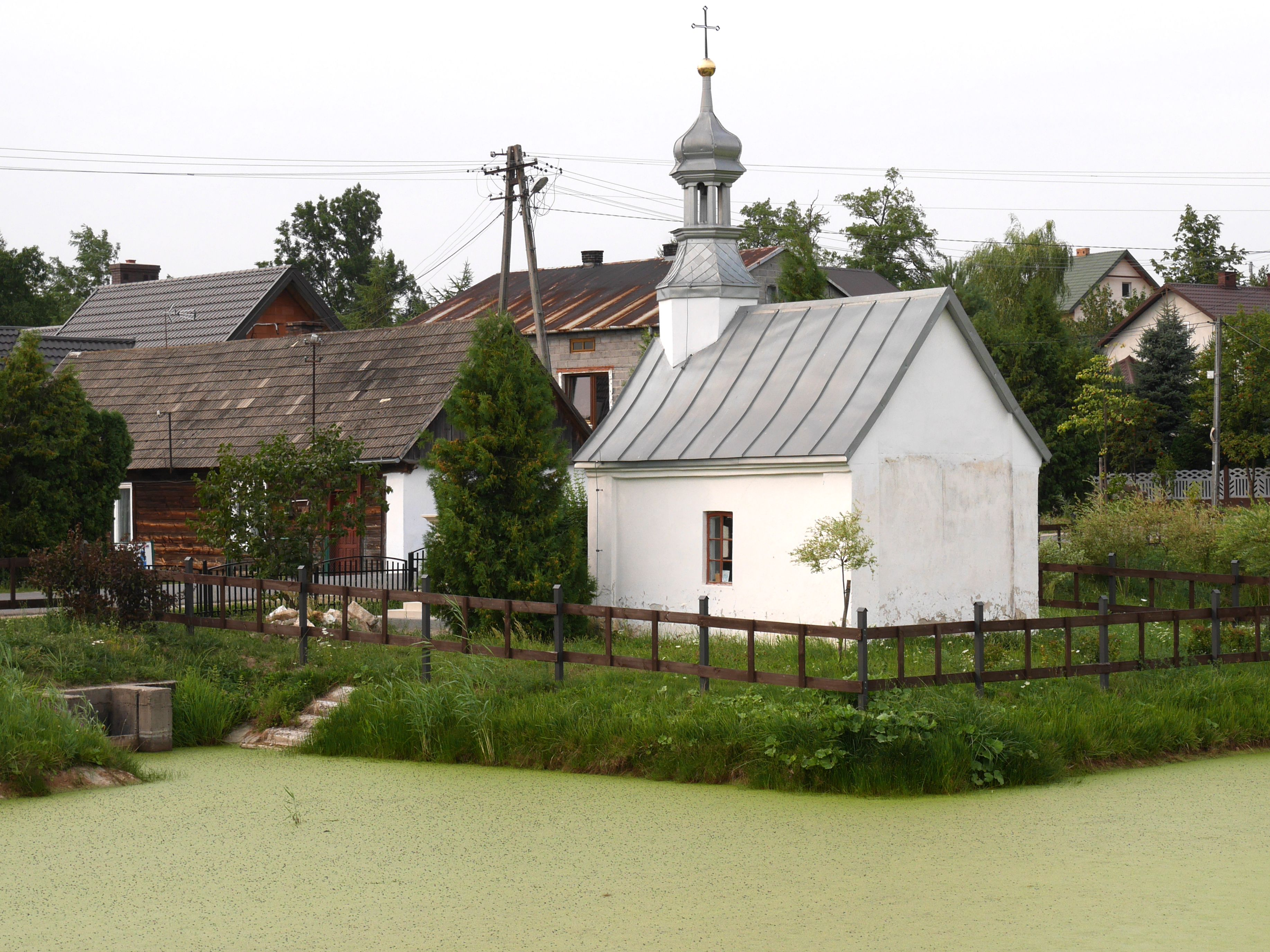 Chapel in Brudzów